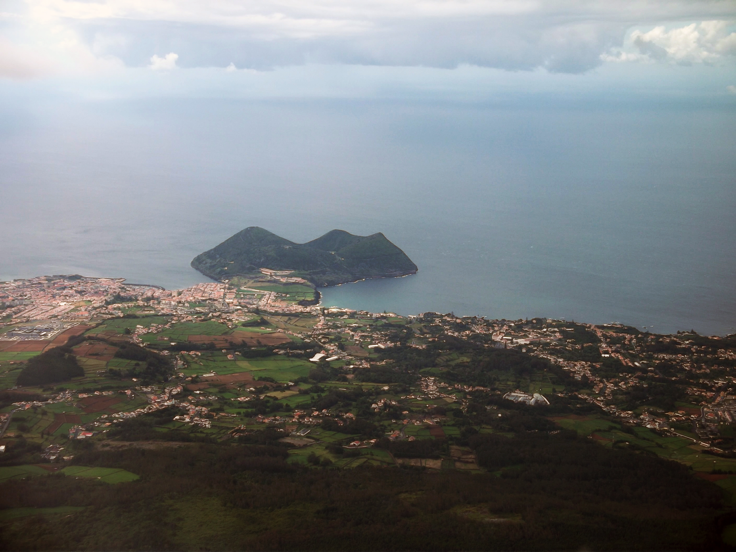 Angra do Heroísmo, vista parcial, Monte Brasil em pano de fundo, ilha Terceira, Açores, Portugal